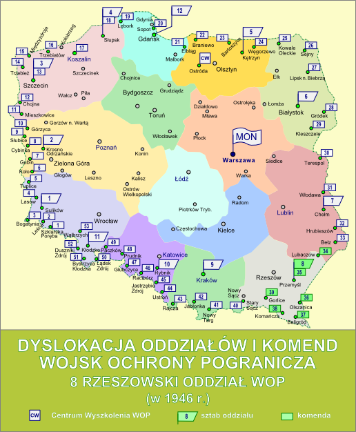 Dyslokacja oddziałów i komend Wojsk Ochrony Pogranicza w październiku 1946 r. - 8 Rzeszowski Oddział WOP